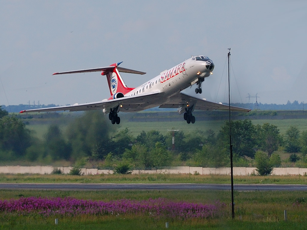 Ту-134А авиакомпании «Самара» взлетает из аэропорта Курумоч